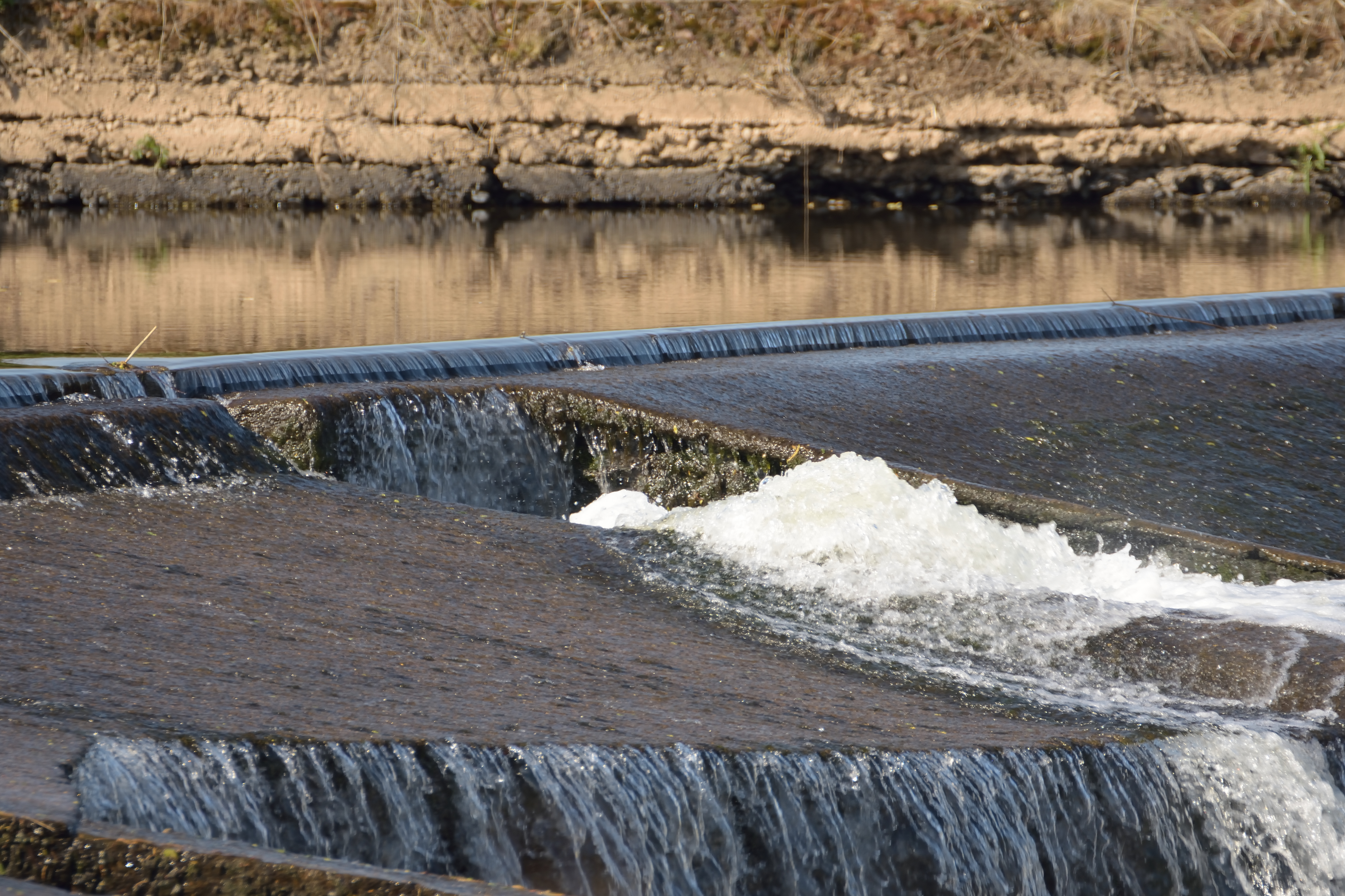 Nahe-Damm in Gensingen im Naturschutzgebiet „Untere Nahe“ (NSG 7133-053)